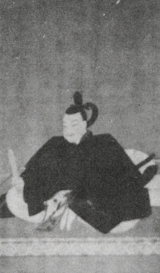 前橋藩主・酒井忠挙の肖像画。